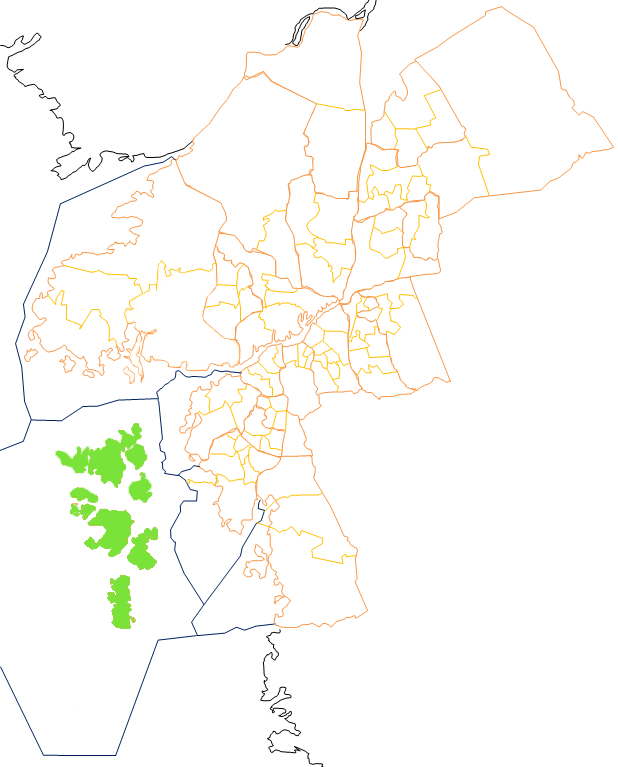 Karta som visar primärområdes belägenhet i Göteborg